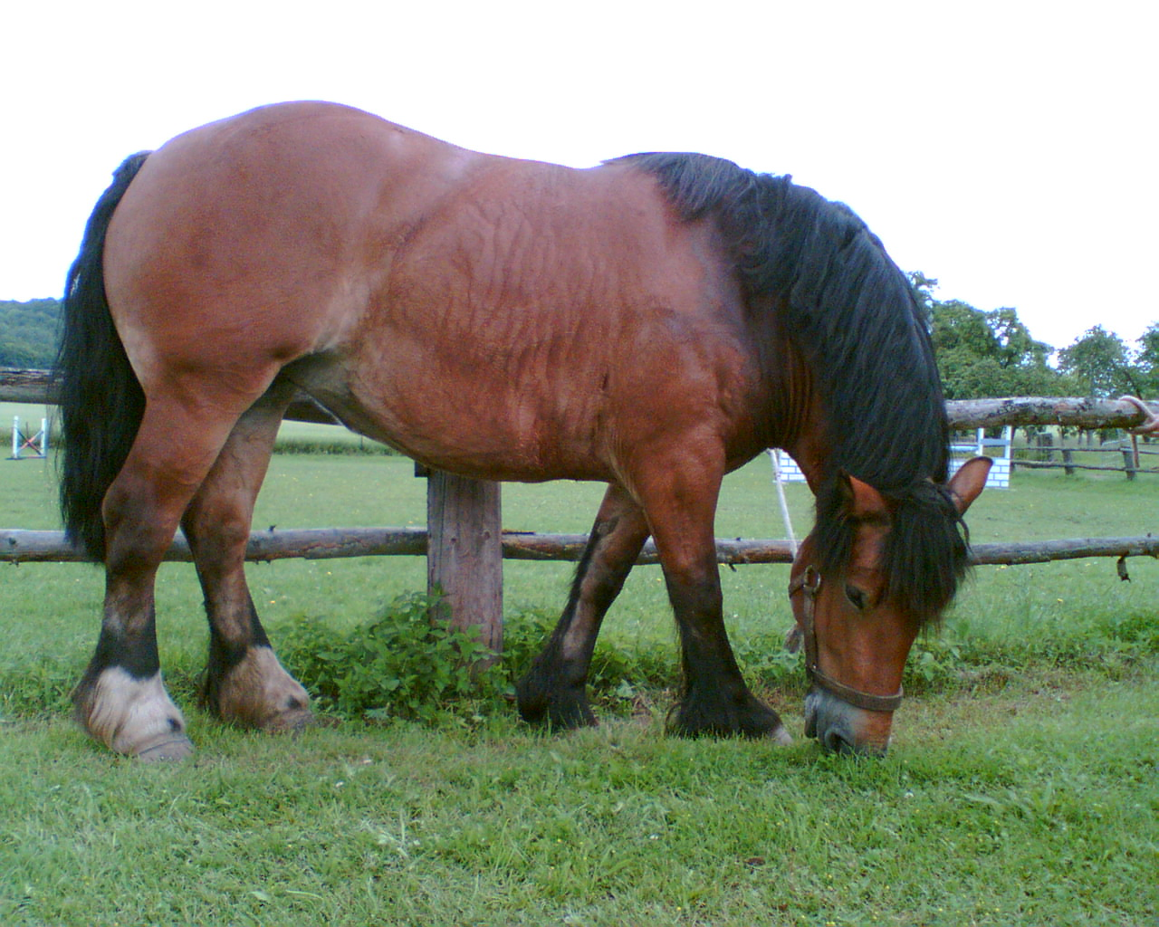 Rheinisch-Deutsches Kaltblut zu Gast im Gestüt Hunnesrück am Tag des offenen Hofes